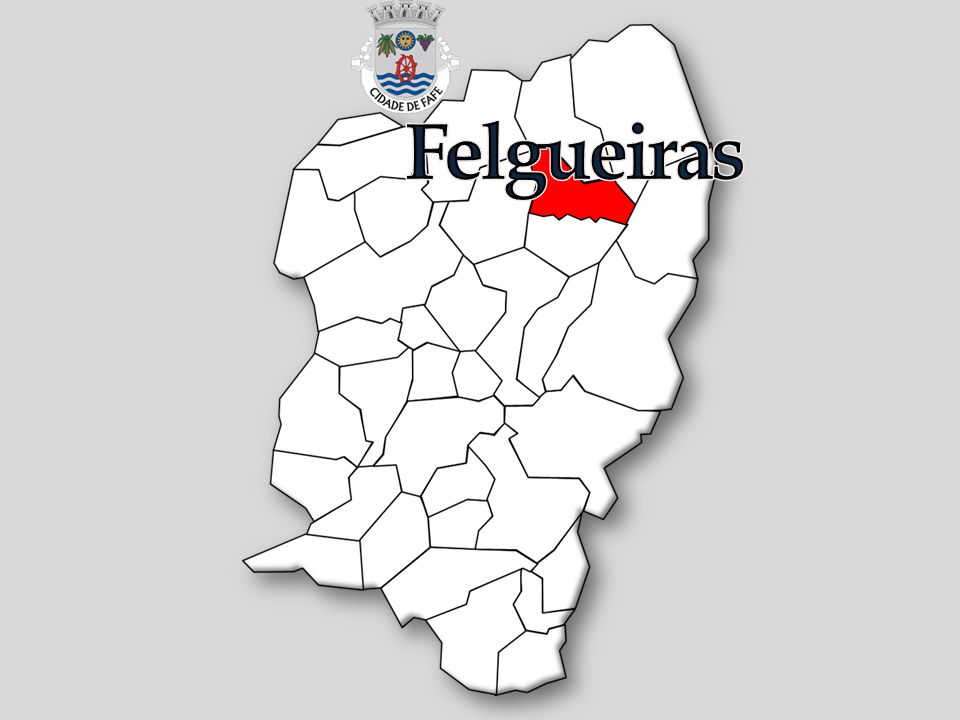 Censos 1864/2011